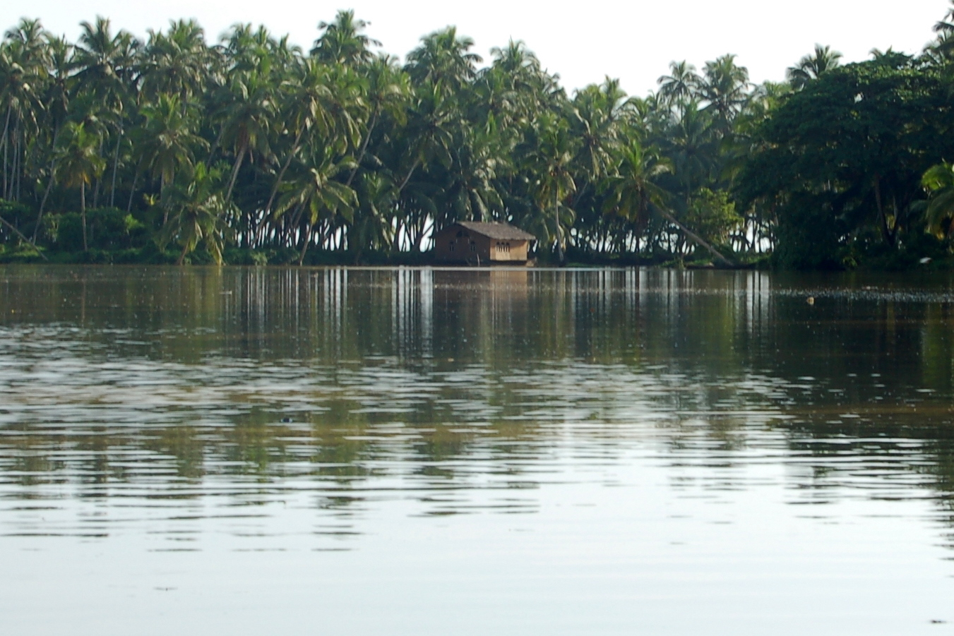 Kovalam, Karamana River